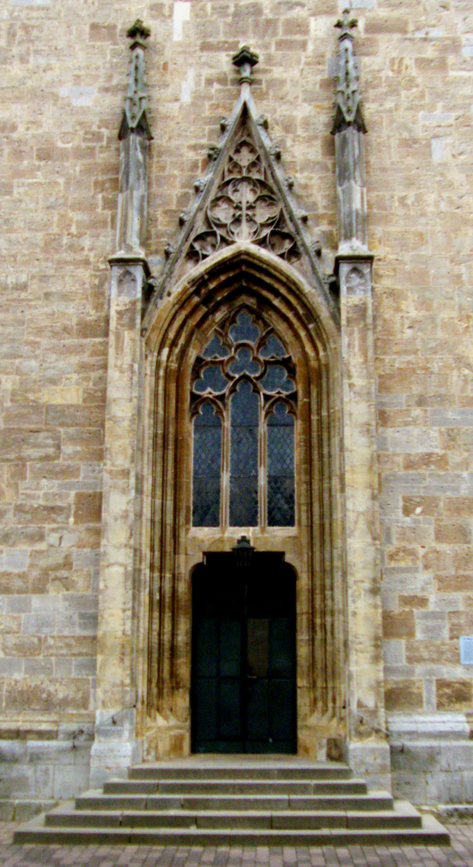 Korbach - Hauptportal der Nikolaikirche